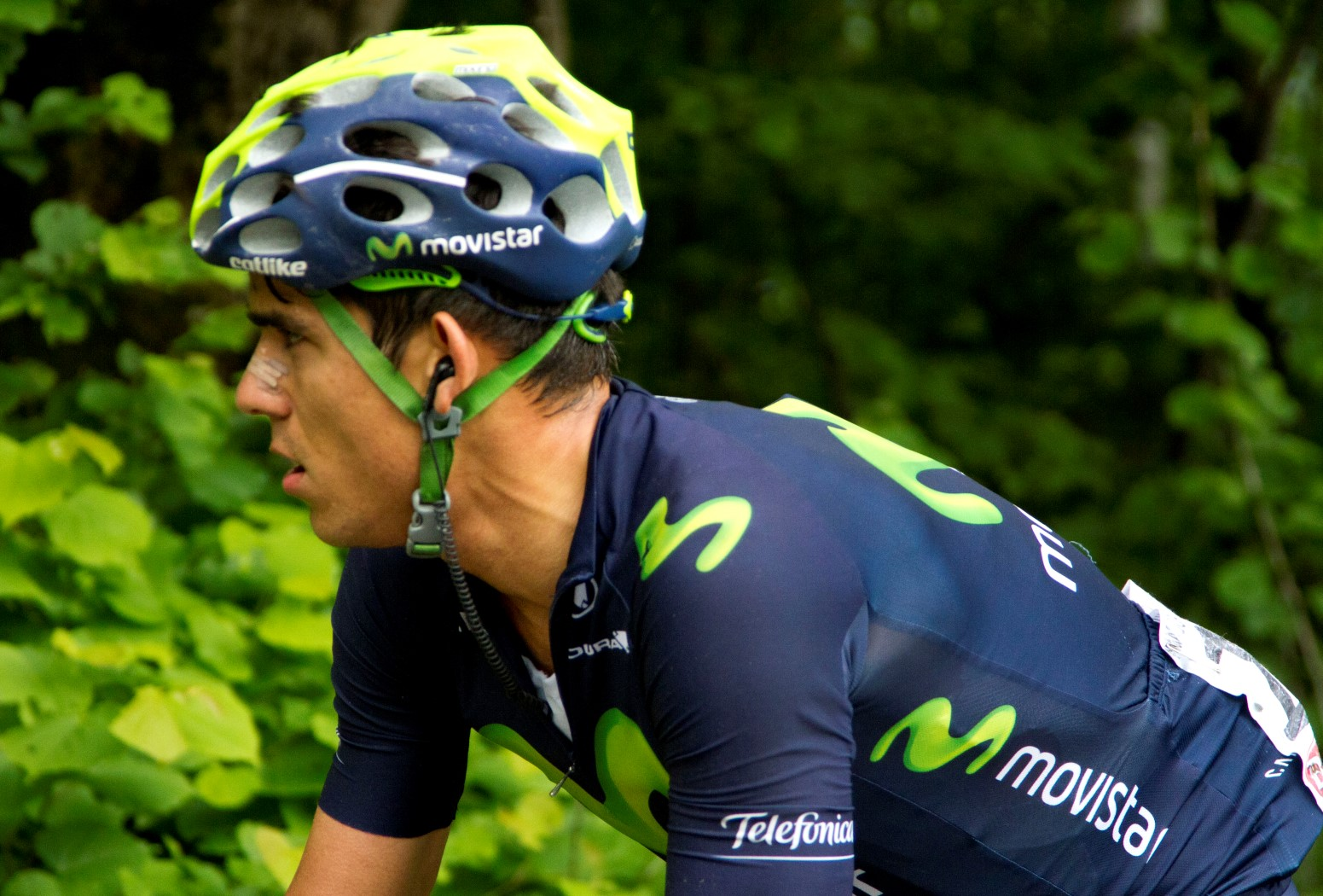 110 amador